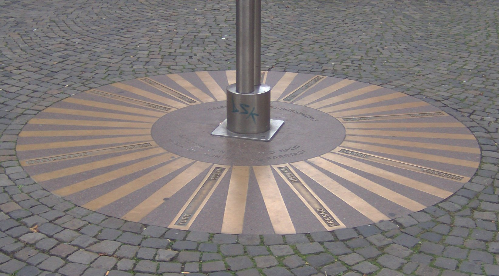 Bodensatz einer Skulptur vor Karstadt in Münster, zeigt die Richtungen und Entfernungen zu den Partnerstädten